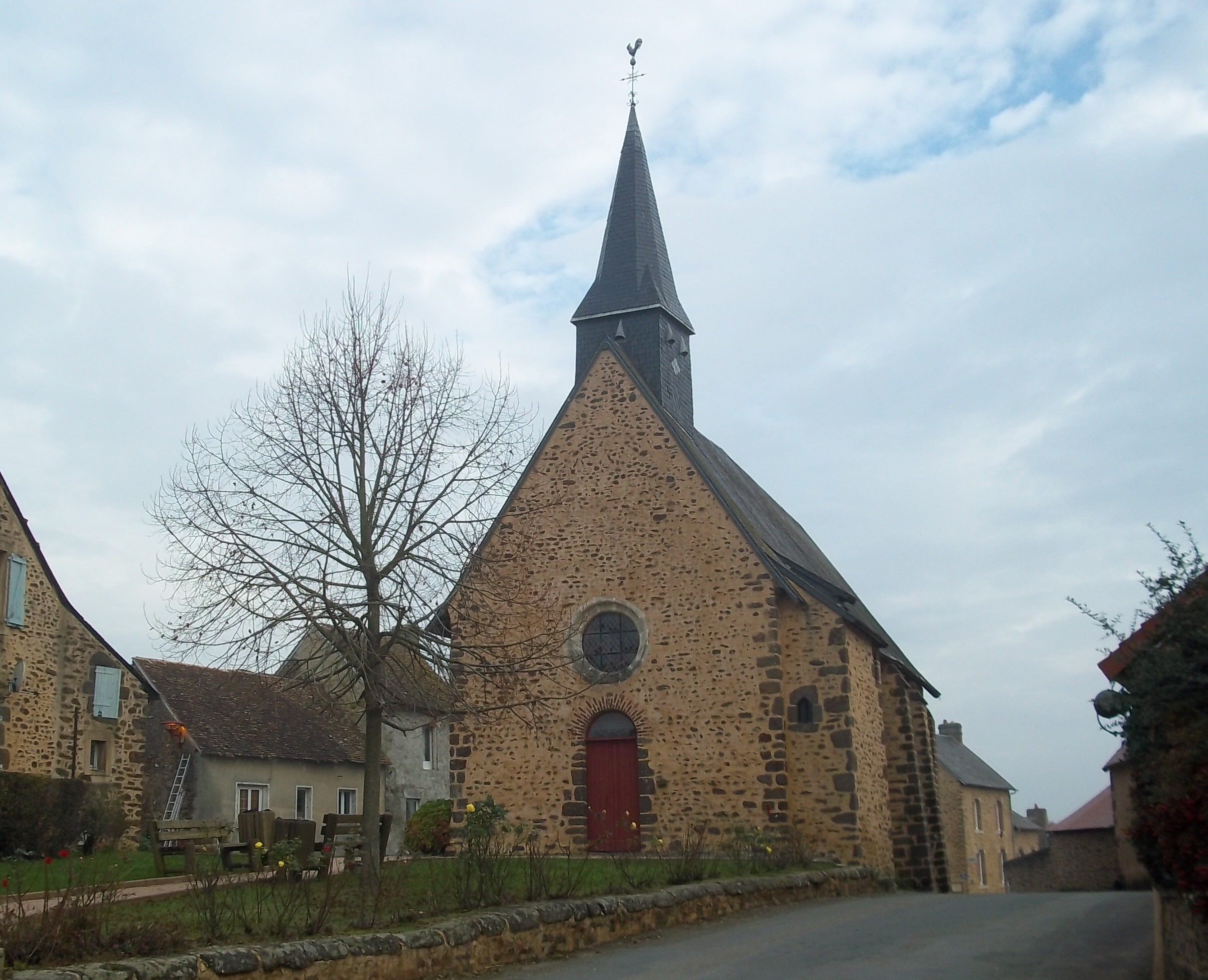 L'église de La chapelle st Fray